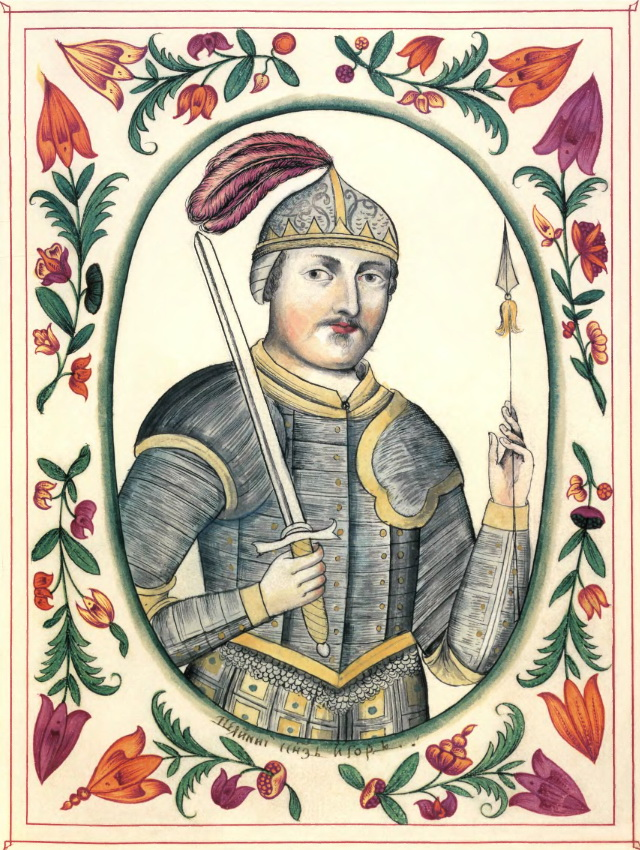 Igor the Old Игорь Рюрикович, царский титулярник